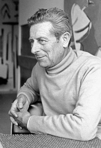 Portrait du peintre Louis Van Lint en 1984